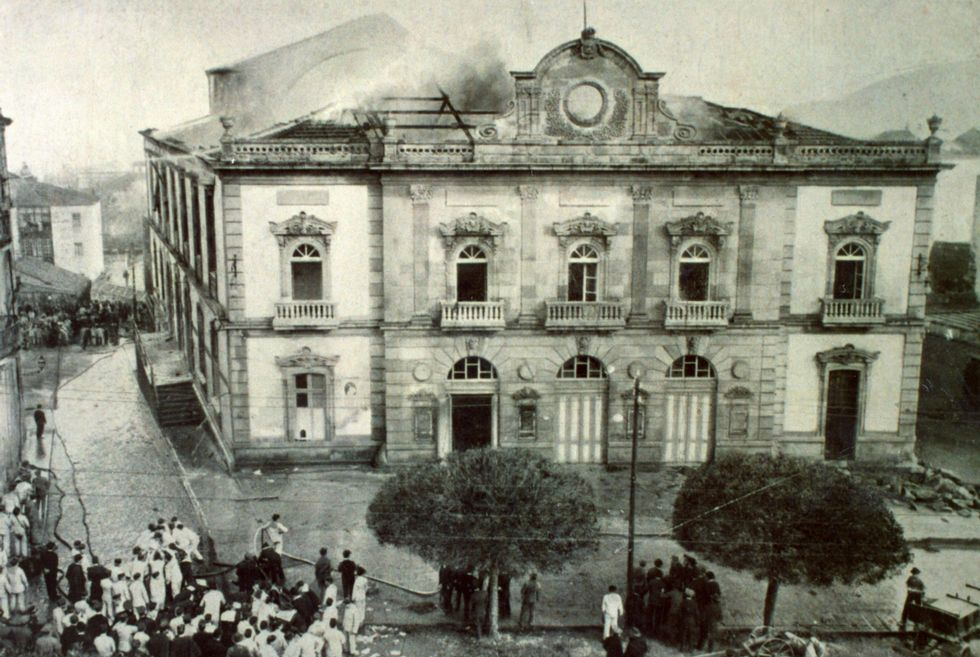 Teatro Rosalía de Castro de Vigo. 1910.jpg